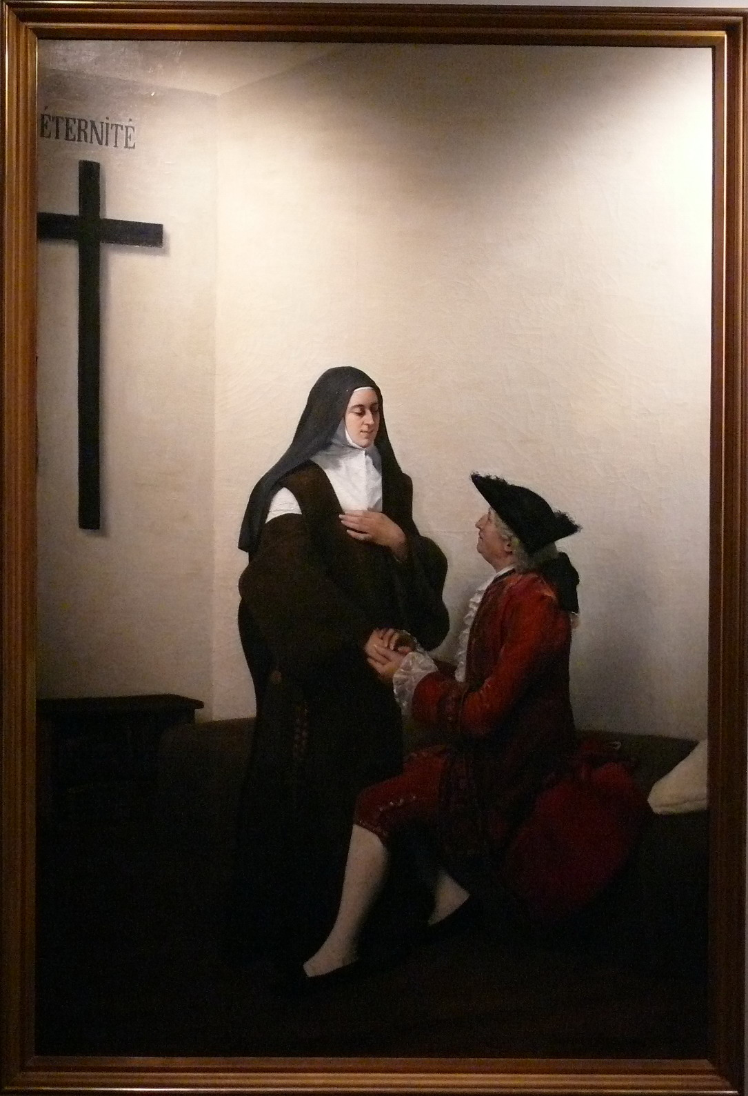 Maxime Le Boucher : Visite de Louis XV à Madame Louise de France (au Carmel de Saint-Denis) Huile sur toile présentée au Salon de 1882, et exposée au Musée d'Art et d'Histoire de Saint-Denis, installé dans l'ancien Carmel.